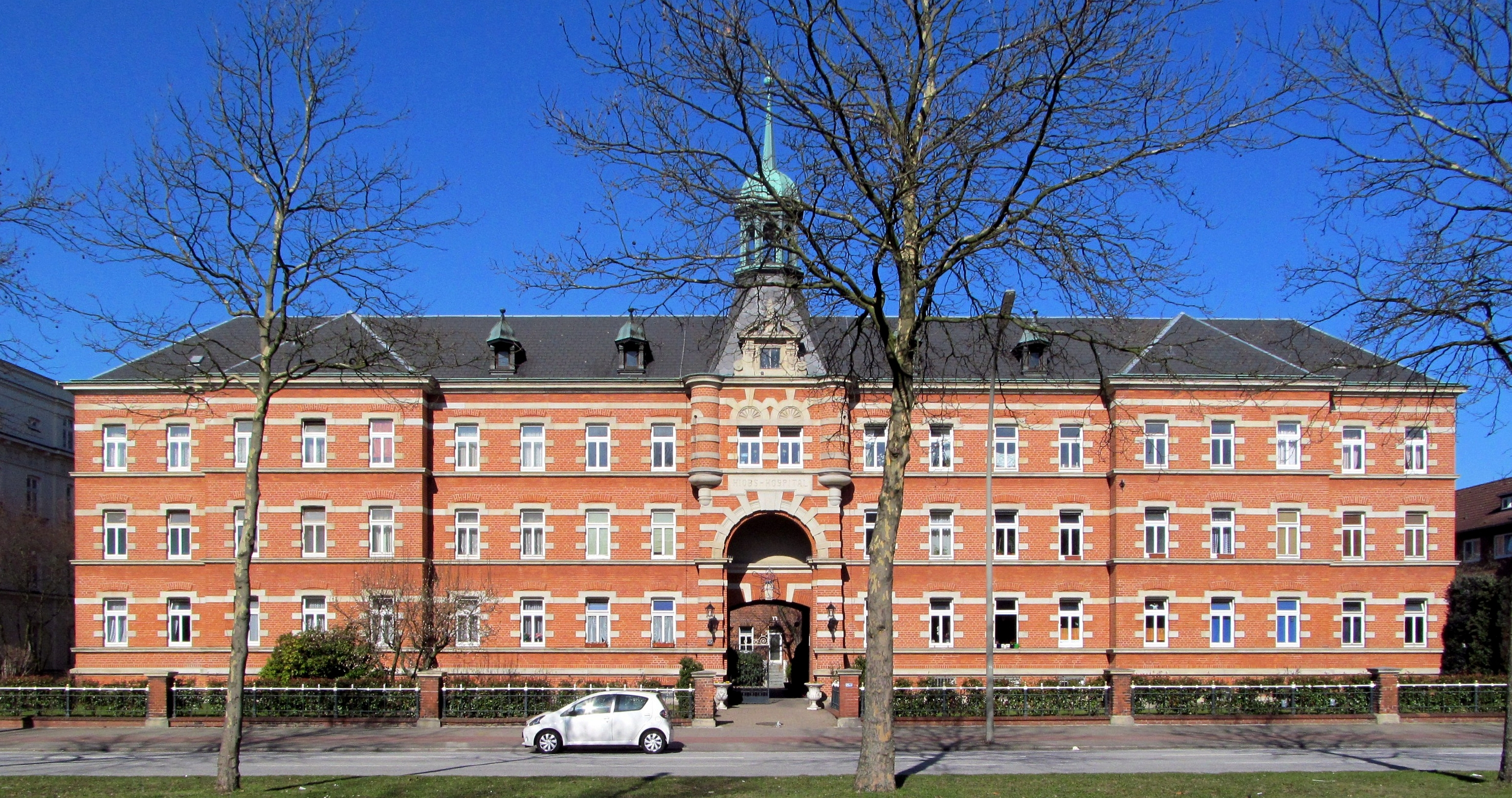 Hiobshospital, erbaut 1883-84 This is a photograph of an architectural monument.